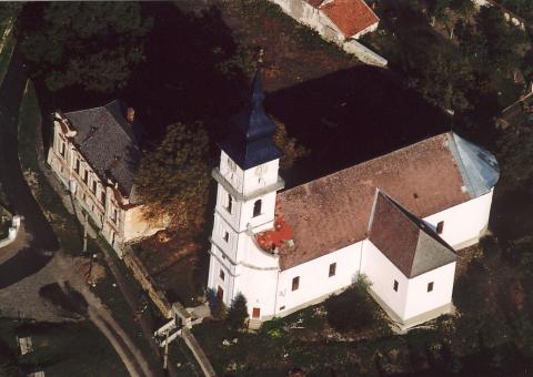 Tállya, Hungary, aerialphotography Református templom, barokk, 1753. Bővítve 1805-ben. Tornya 1826-ból. Berendezés: padok, szószék, copf, 18. sz. vége. A szomszédos lelkészlakban késő reneszánsz, 17. sz.-i részletek. - Borsod-Abaúj-Zemplén megye, Tállya, Bocskai u. 11.